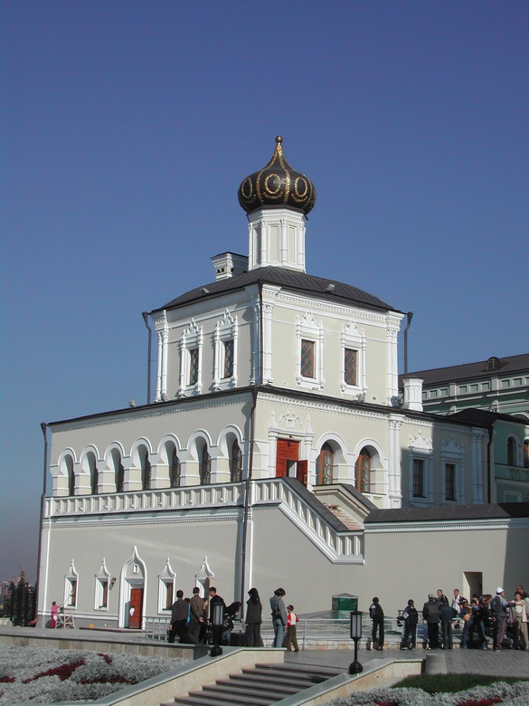 Здание Дворцовой церкви в Казанском кремле, г. Казань, Татарстан, Россия